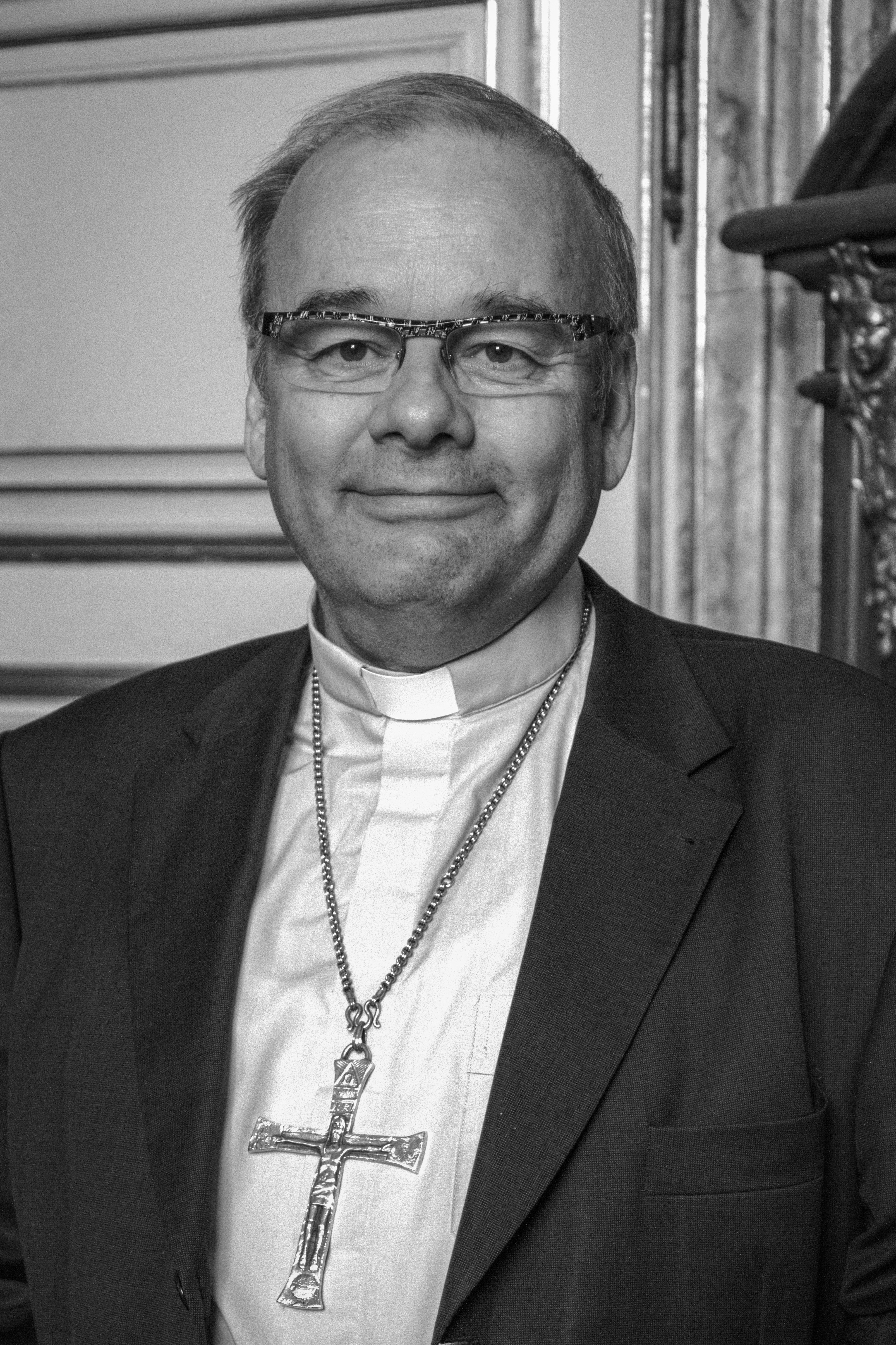 Mgr Christian Kratz, né le 28 janvier 1953 à Strasbourg, est évêque auxiliaire de Strasbourg depuis 2001.